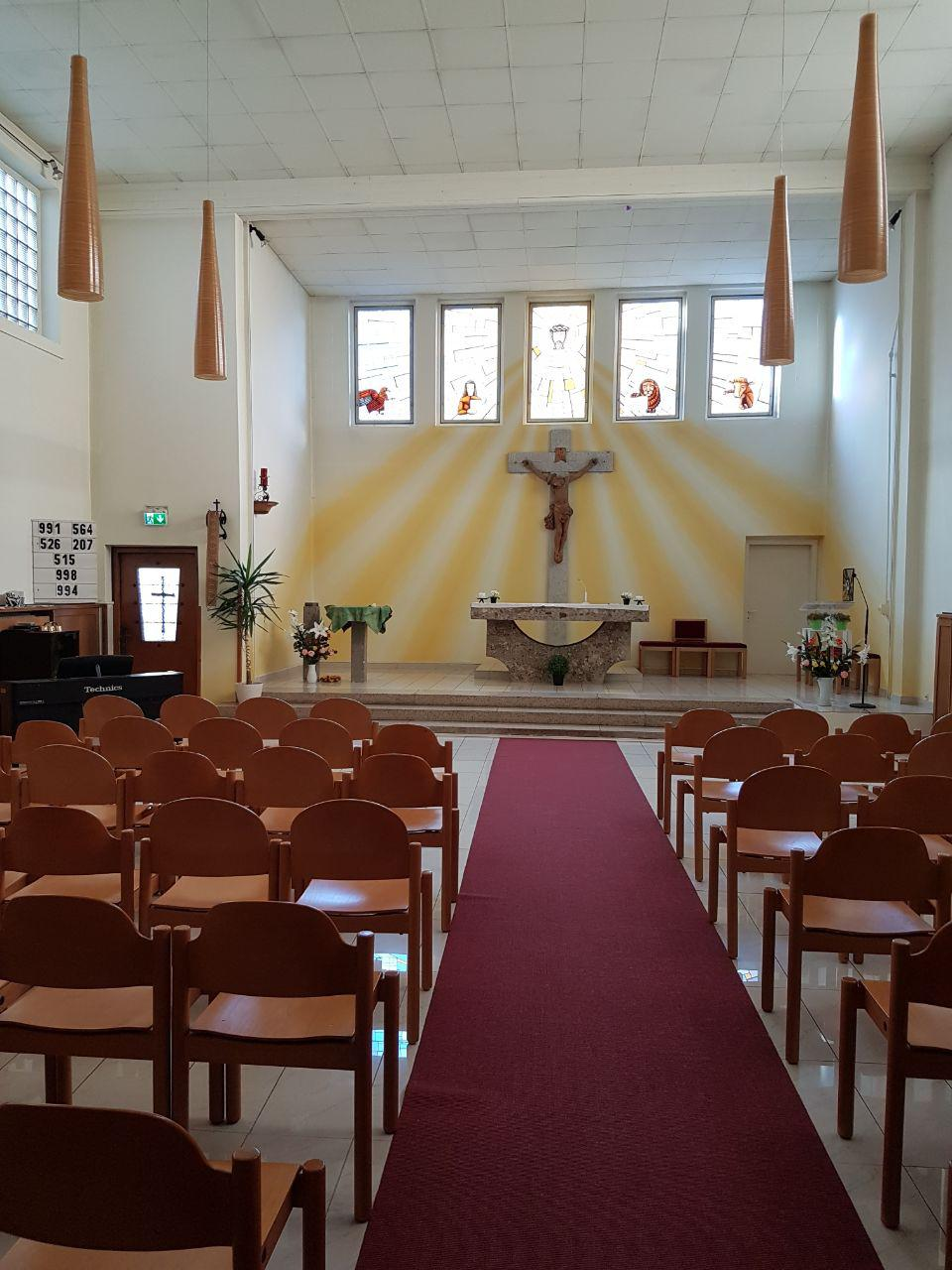 Wien, Altkatholische Heilandskirche, Blick zum Altar